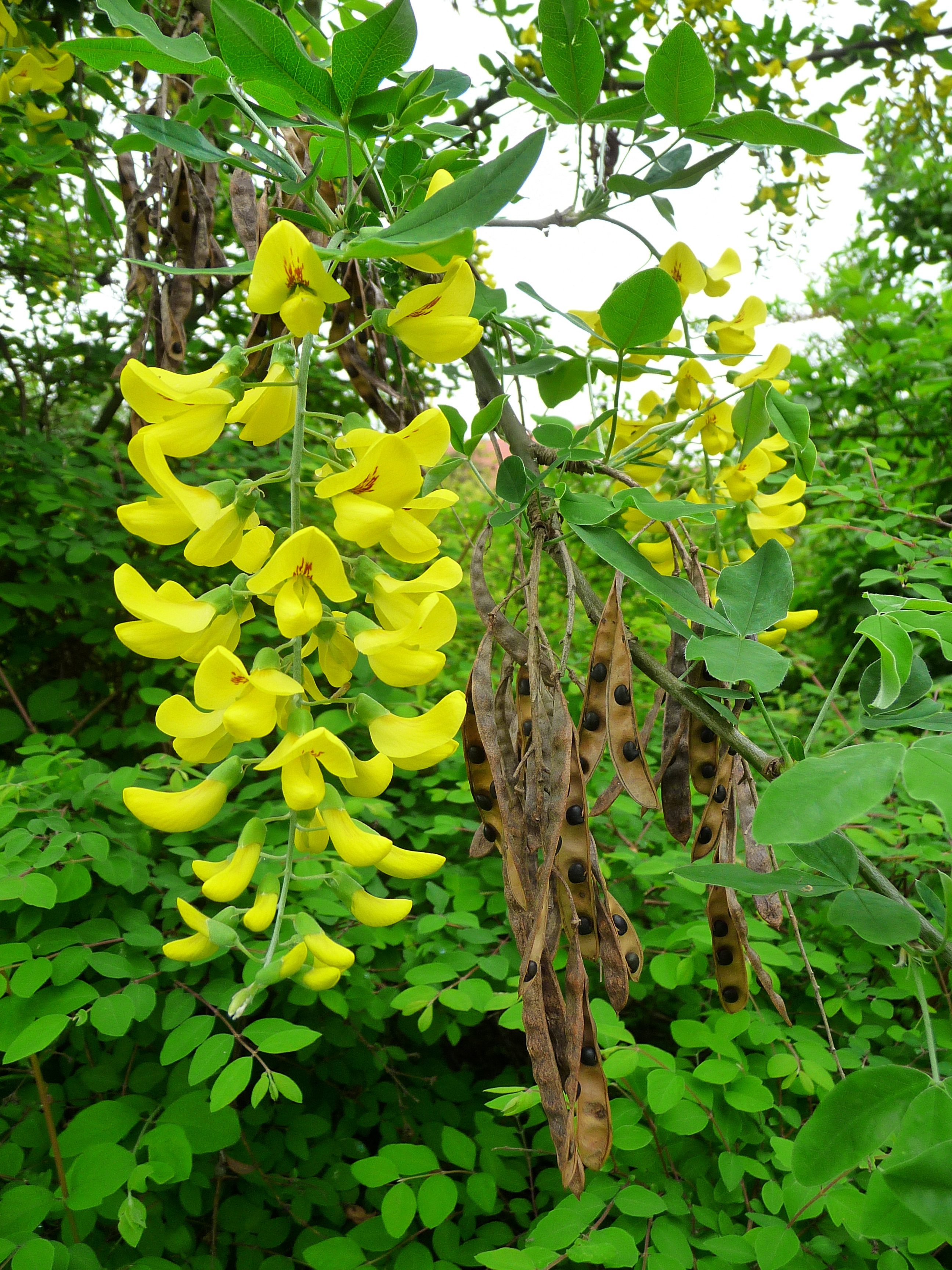 Blüten und Fruchthülsen des Gemeinen Goldregen (Laburnum anagyroides), fotografiert in Heidelberg (Baden-Württemberg, Deutschland)